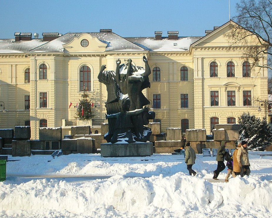 Stary Rynek w Bydgoszczy - widok na ratusz zimą